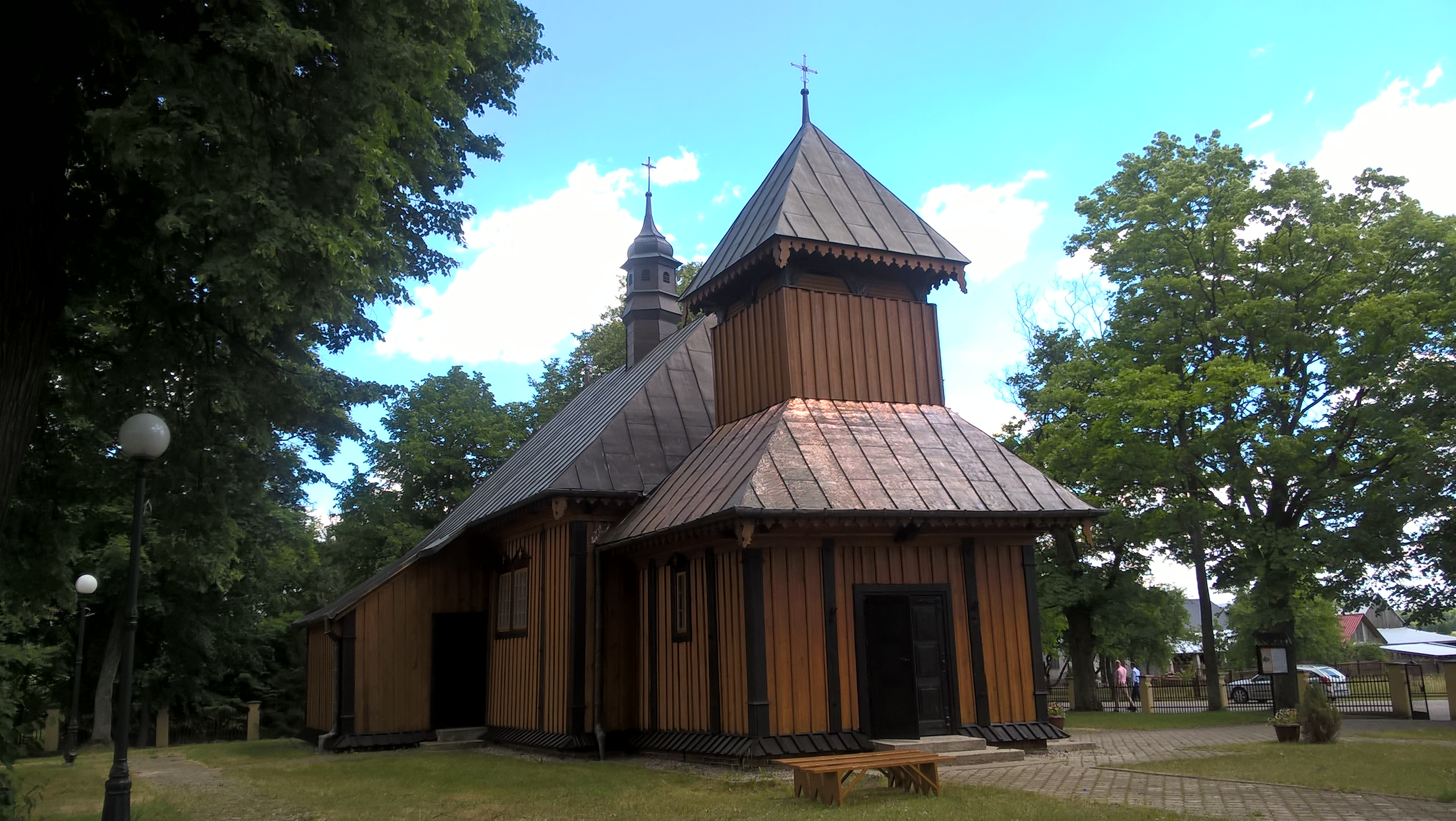 Kościół, dawna cerkiew w Kościeniewiczach